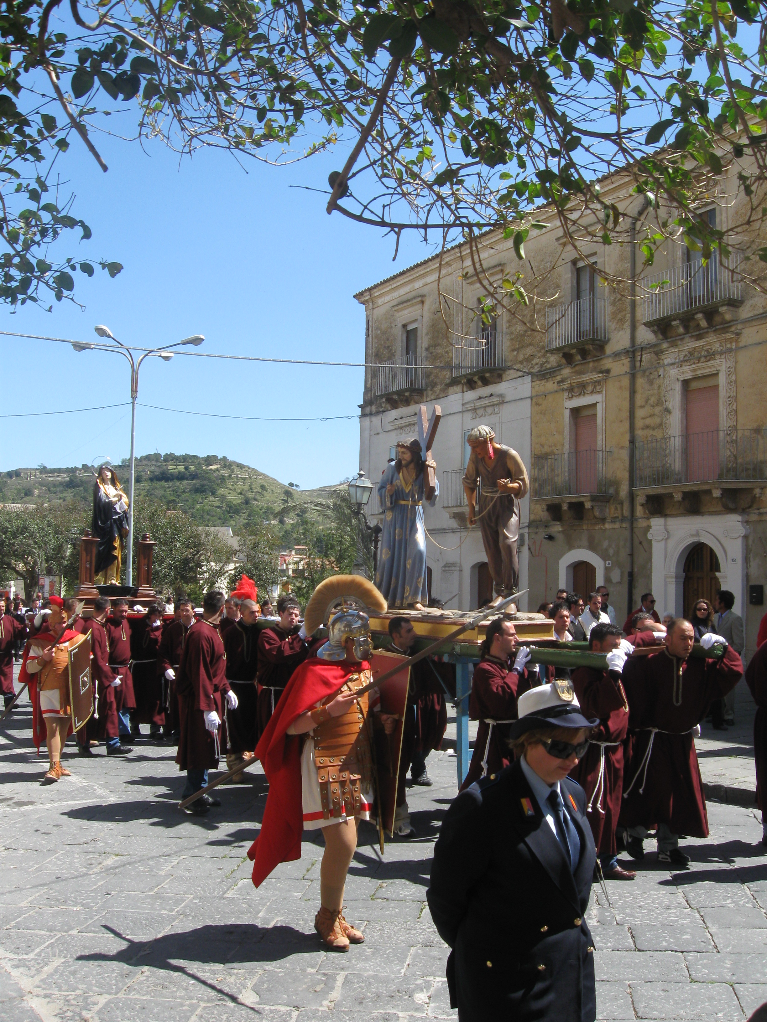 Processione tradizionale del venerdì santo mattina a Licodia Eubea.